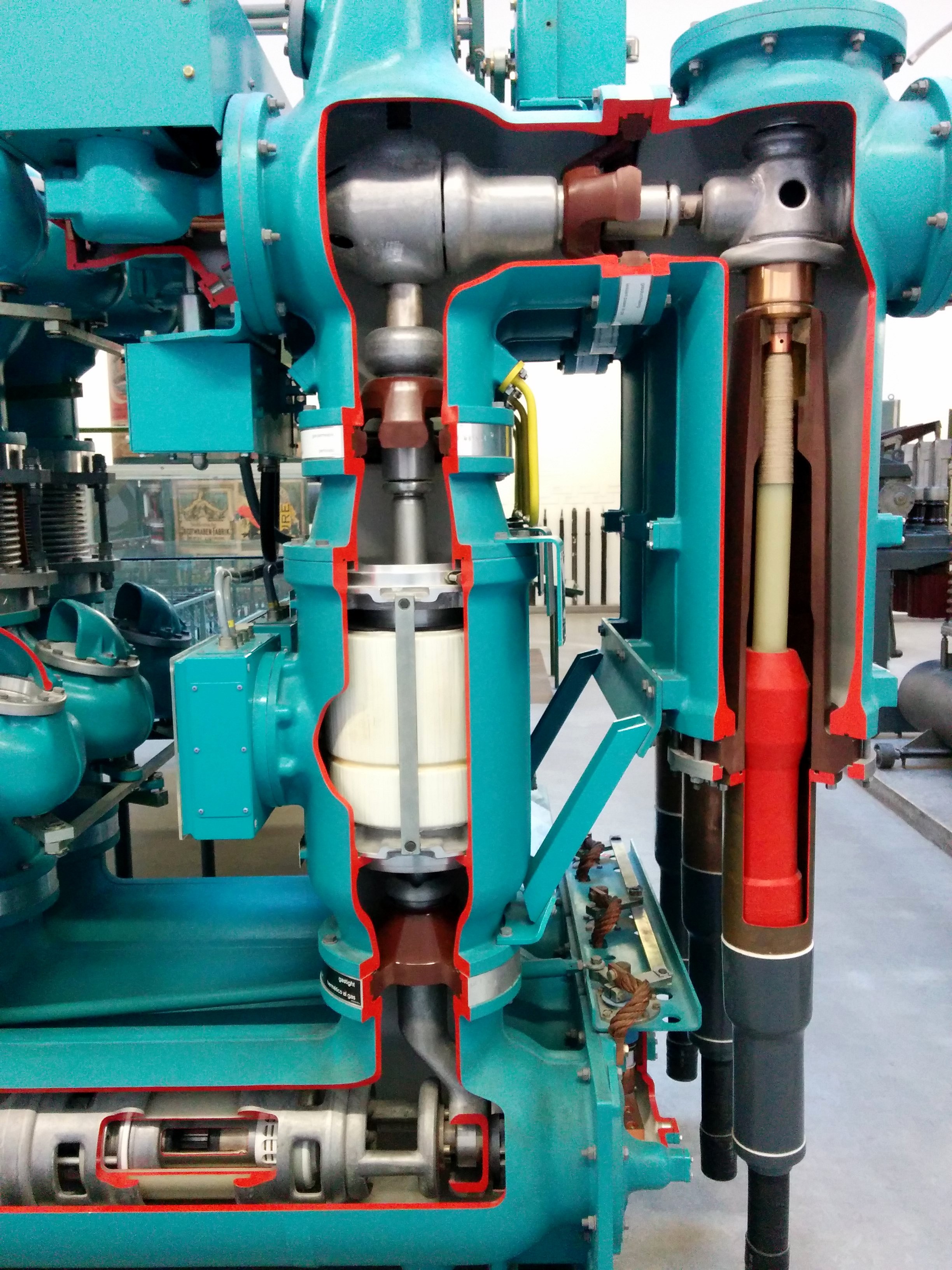 Schnittmodell einer vollisolierten metallgekaspelten SF6-Schaltanlage für Dreiphasenwechselstrom. Teilausschnitt von einem Aussenleiter mit Kabeleinlass, Trennschalter, Stromwandler, Leistungsschalter Hersteller: Siemens AG Berlin, Baujahr 1996 Type: BDN9 Betriebsspannung: 72.5kV bis 145kV Nenn-Betriebsstrom: bis 1,5kA SF6-Gasdruck Rohrsystem: 4,3bar SF6-Gasdruck Leistungsschalter: 6bar